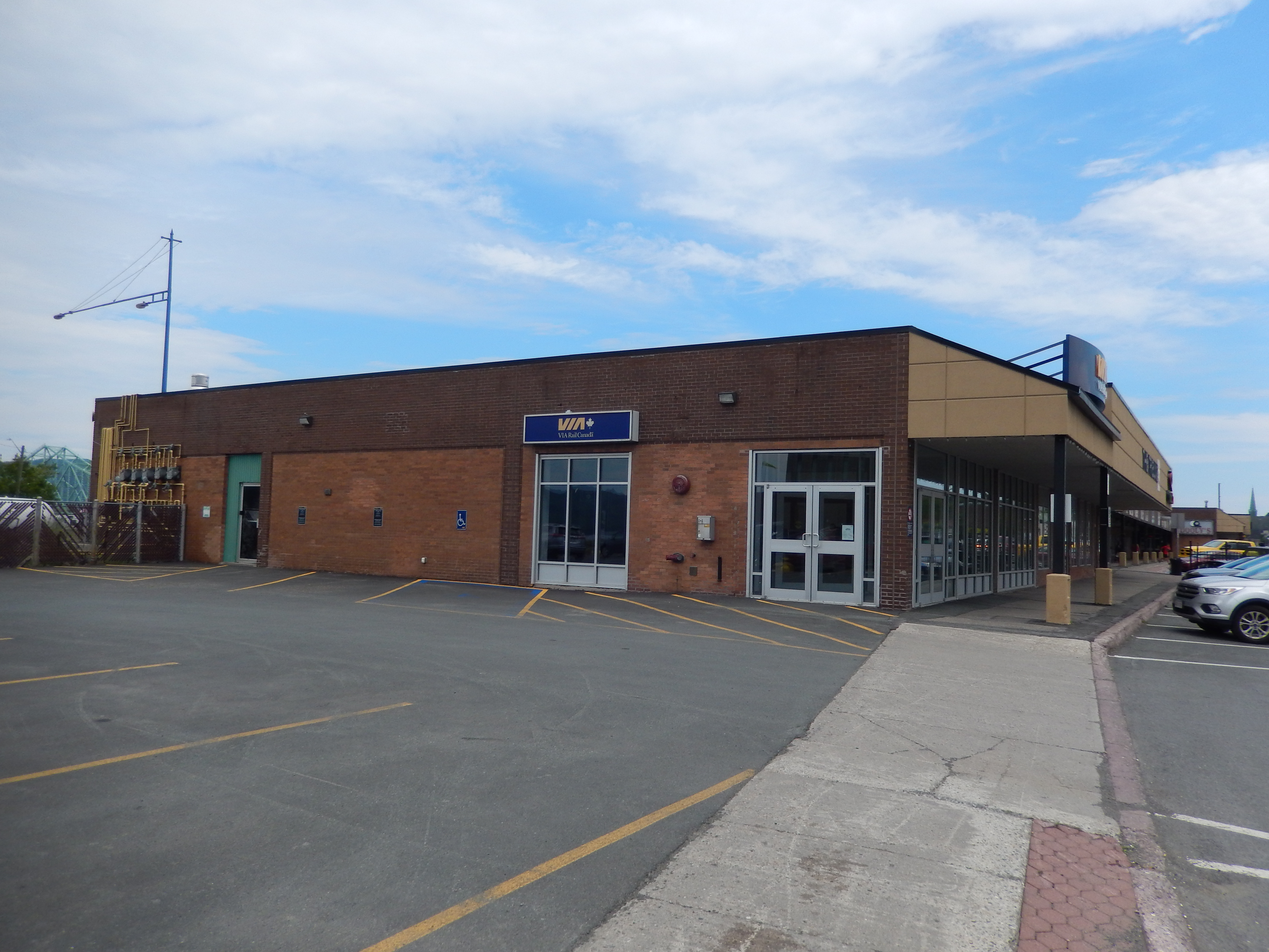 Gare de Campbellton